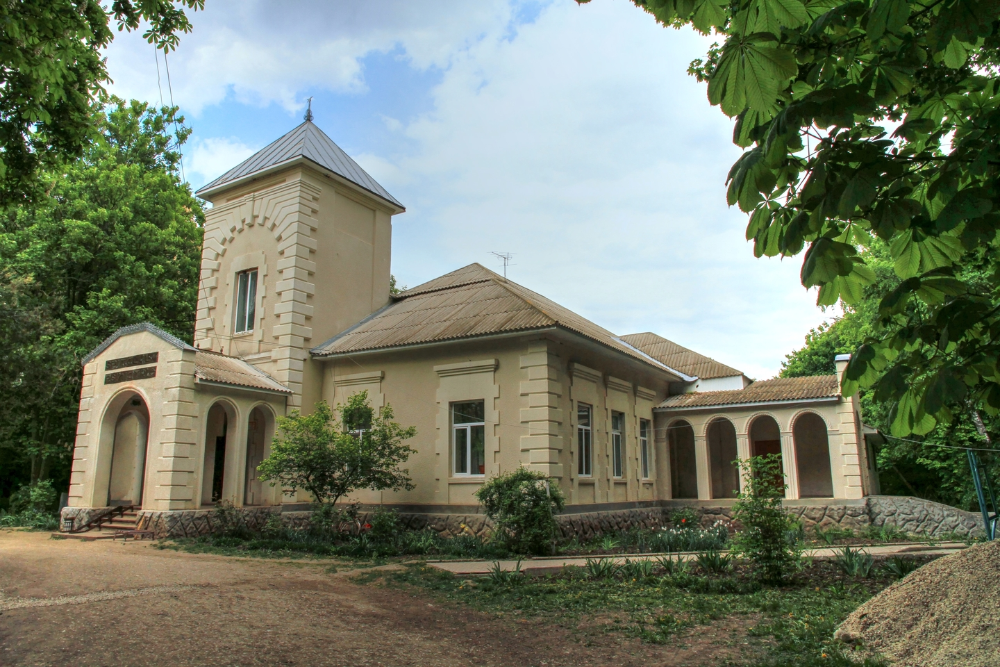 Павловский парк, монумент природы, находится в Бриченский район, с. Павловка (код MD-BR-map-002)